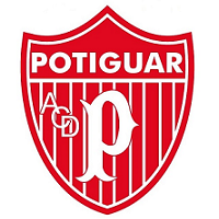 Logo: Associação Cultural e Desportiva Potiguar, Mossoró (RN), Brazil.